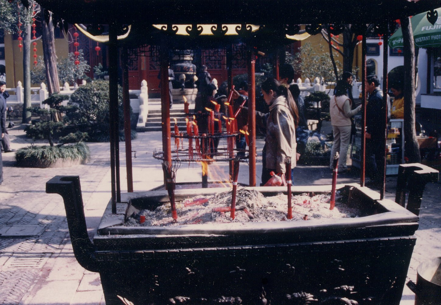 寒山寺大雄宝殿の前庭のようす